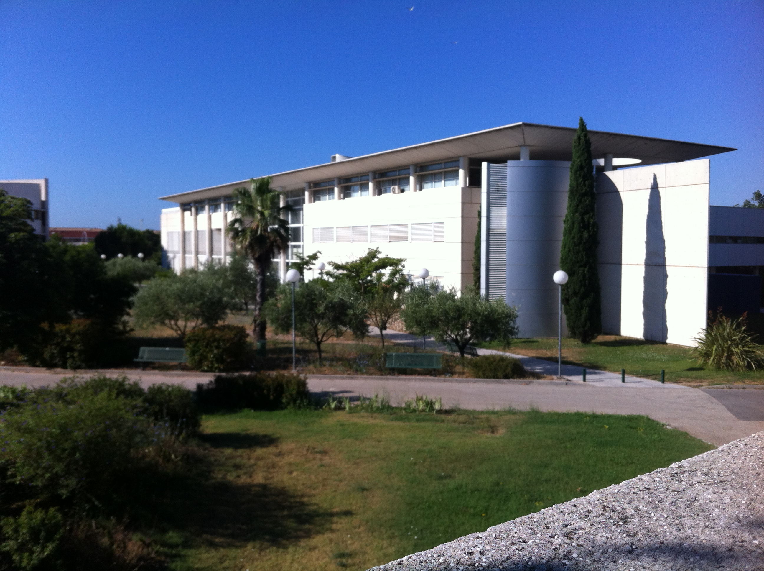 Université de Toulon batiment R